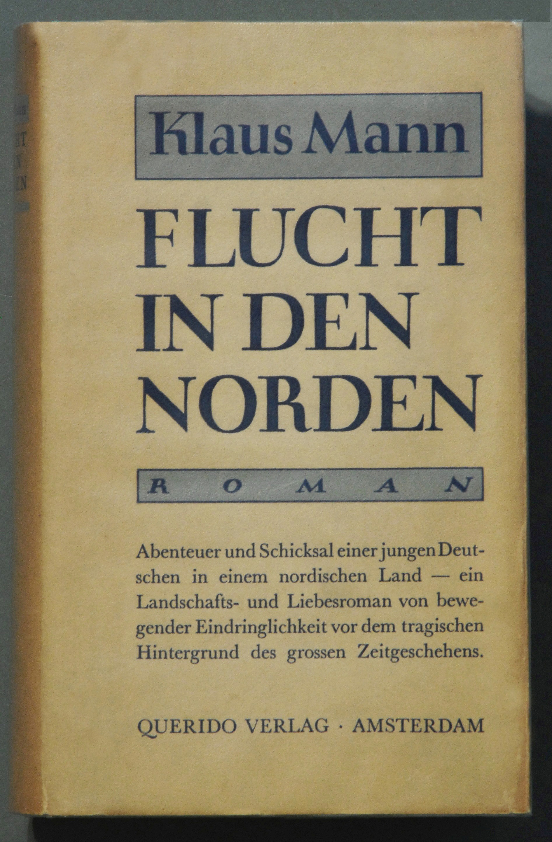 Mann, Klaus: Flucht in den Norden. Roman. Amsterdam: Querido 1934, 319 S.,Verlagsumschlag der Erstausgabe, Wilpert/Gühring² 16. Sammlung H.-P.Haack.